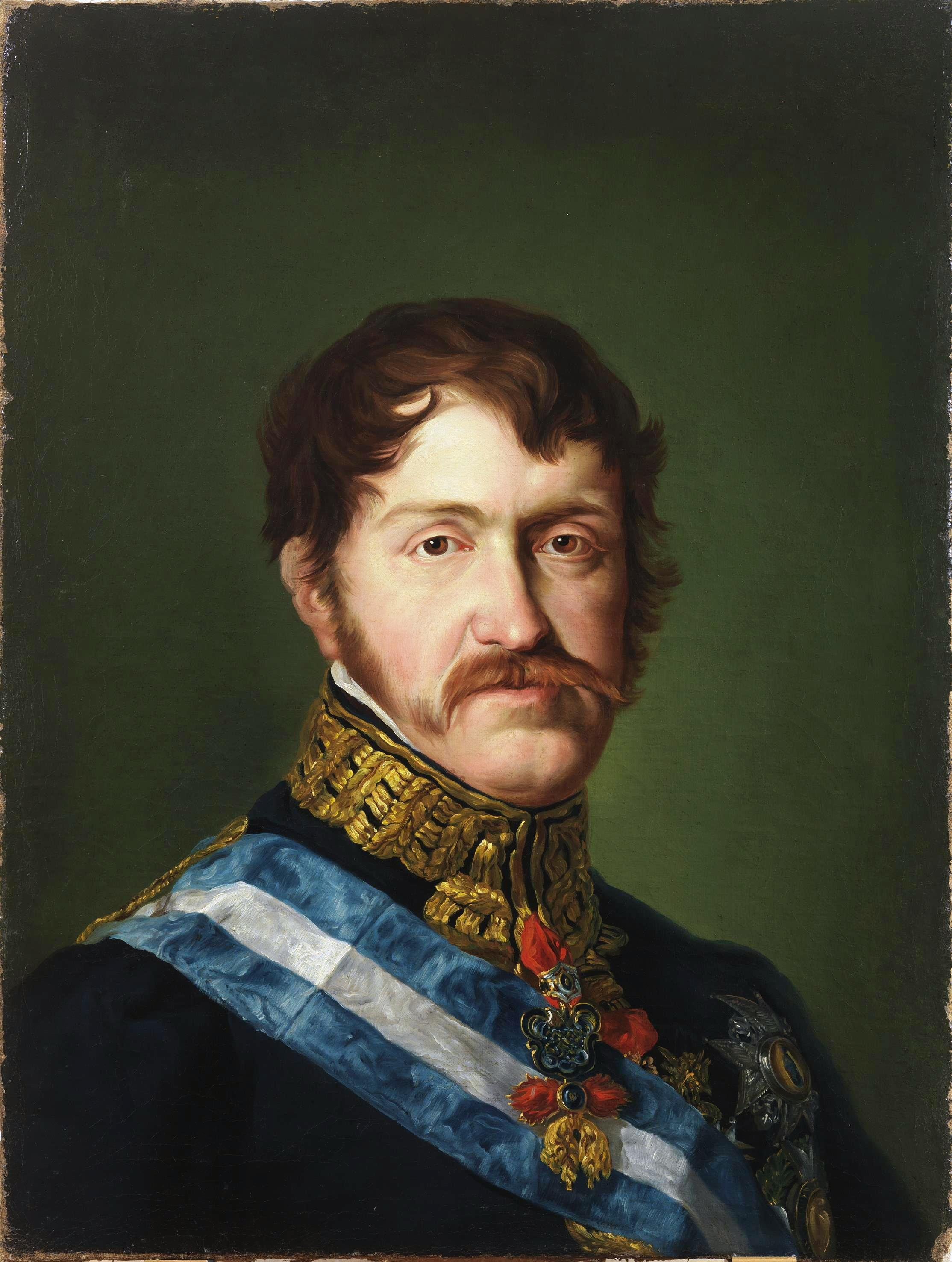 Retrato del infante Carlos María Isidro de Borbón (1788-1855), con uniforme de capitán general y portando varias condecoraciones. Era hijo del rey Carlos IV de España y hermano de Fernando VII. La gran calidad de esta obra, a pesar de su aspereza, ha llevado a algunos autores a afirmar que debe ser considerada como obra indiscutible de Vicente López Portaña, ya que además en el dorso del lienzo hay una inscripción antigua que lo corrobora. Y los mismos autores aseguran que este retrato pudo haber sido tomado del natural para ser empleado posteriormente en el retrato del infante Carlos María Isidro del mismo autor que se conserva en la Real Academia de Bellas Artes de San Fernando de Madrid.